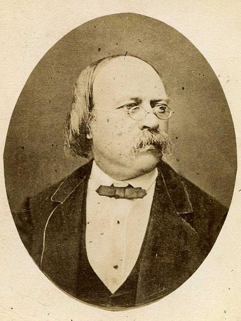 Antoním Vánkomil Maloch, středoškolský profesor, historik, topograf